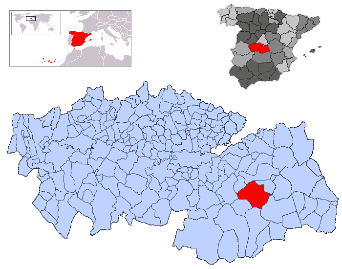 Tembleque en la provincia de Toledo